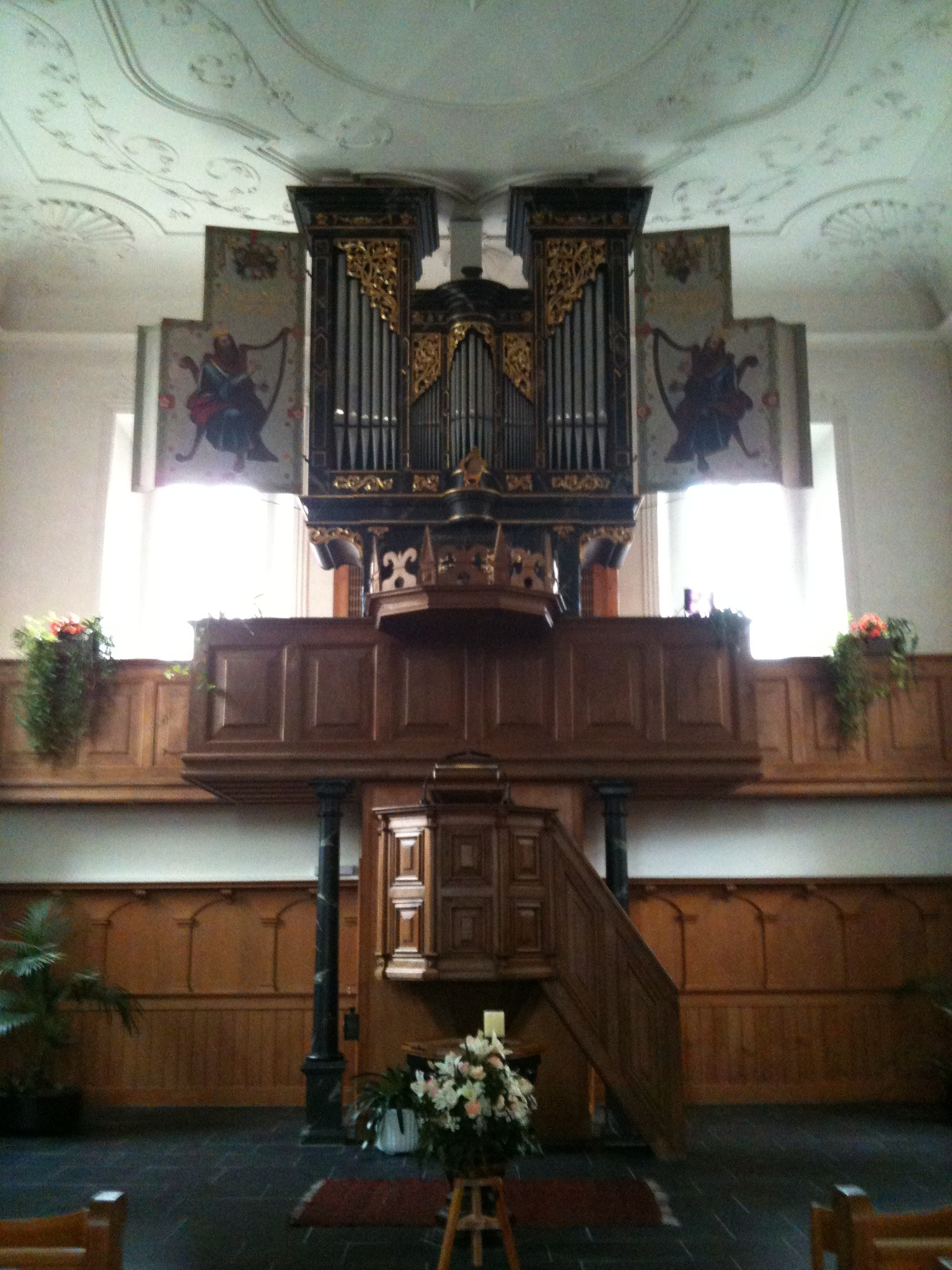 Kanzel und Orgel in der reformierten Kirche Maienfeld, Kanton Graubünden